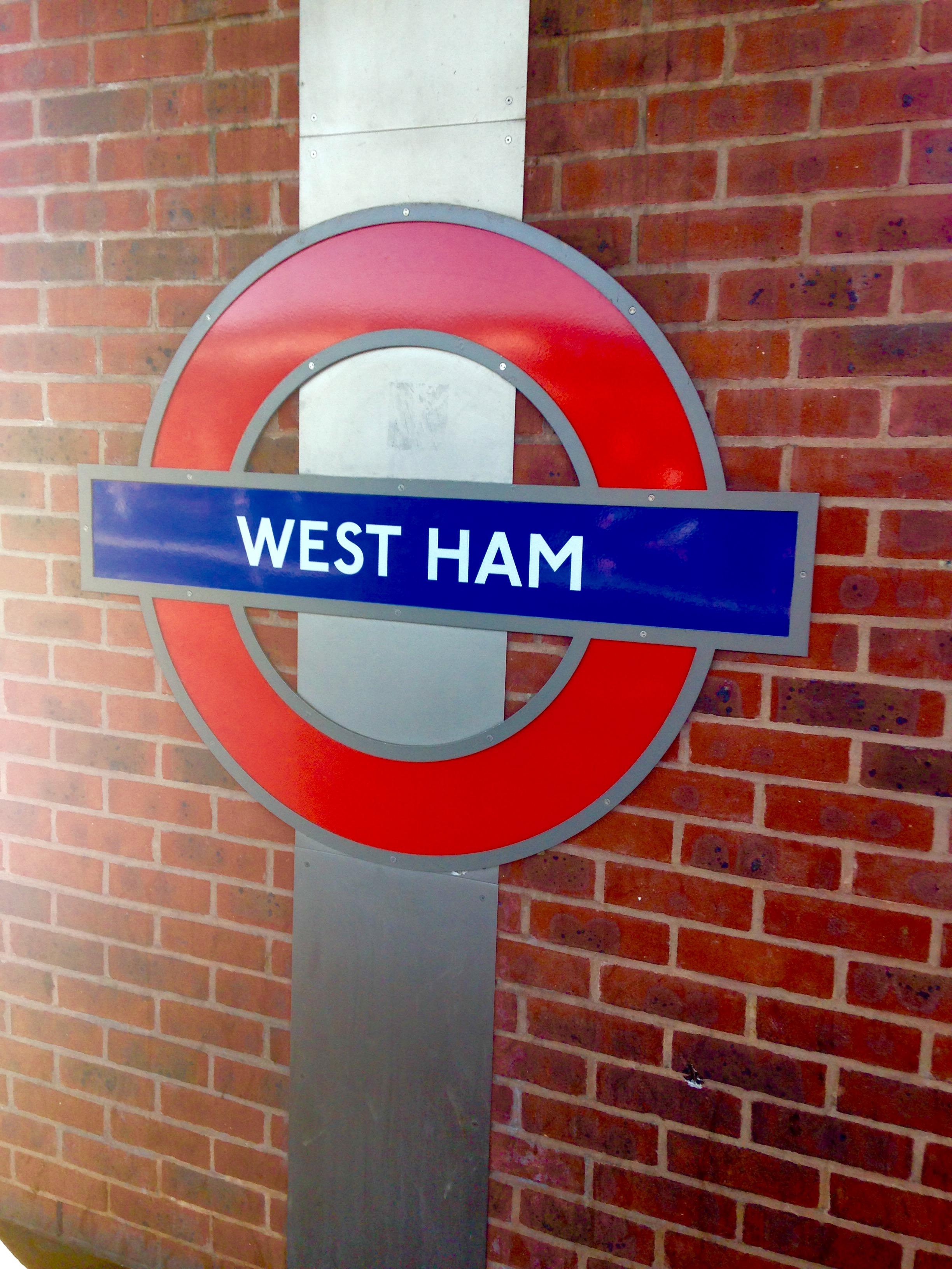 Station West Ham du métro Londonien